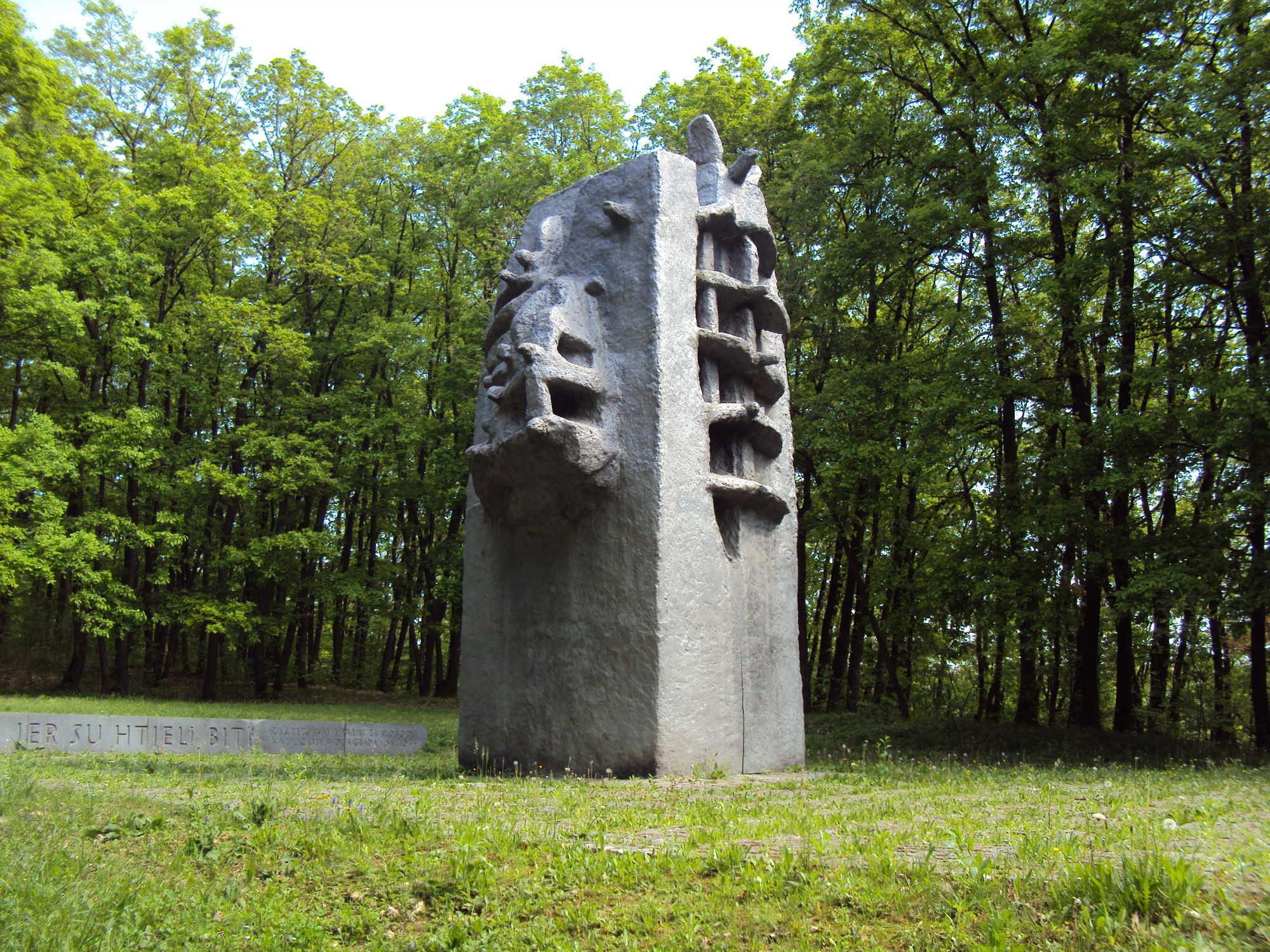 Фотографисано 28. априла 2010. у Загребу. Аутор: Пламен